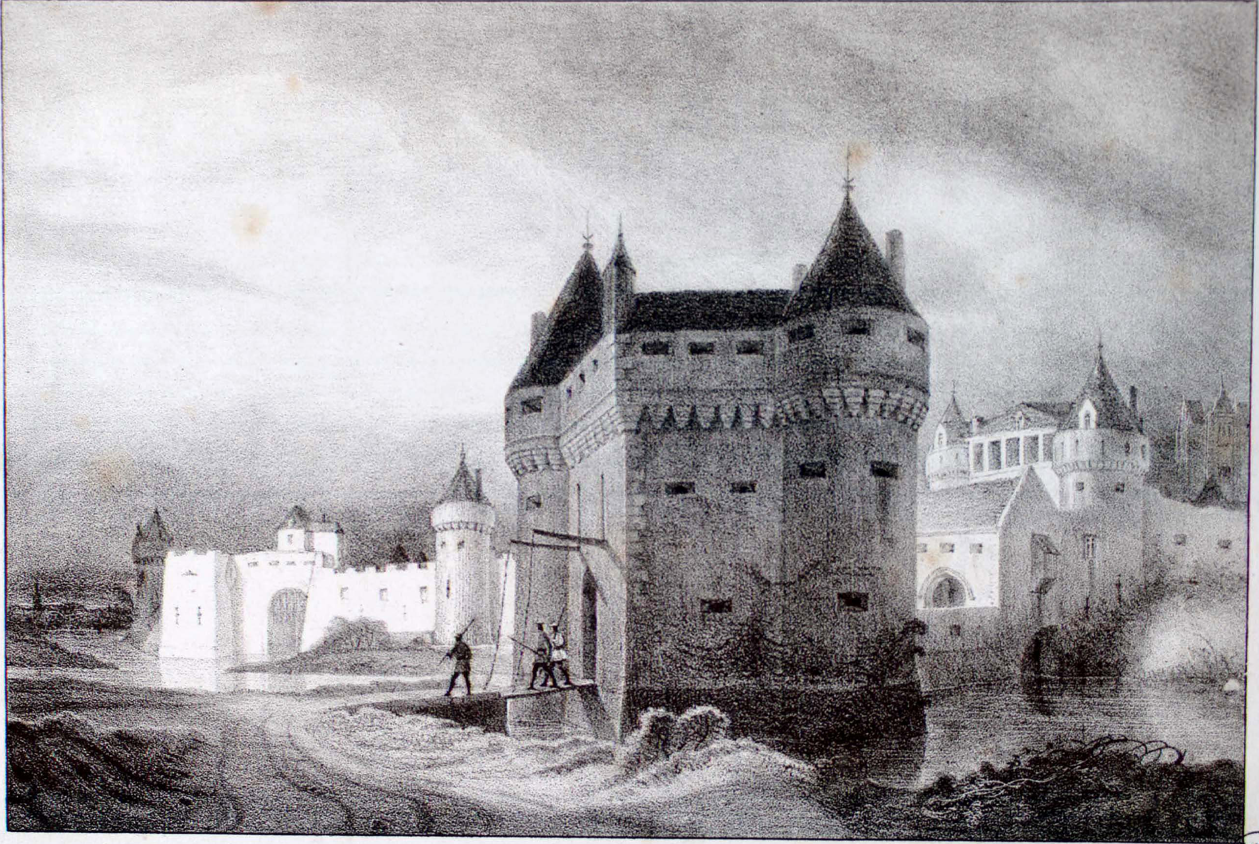 Ce fichier est recadré pour être utilisé dans les articles, pour le fichier d'origine voir : Titre du document: PORTE SEPTENTRIONALE, OU DE ST. PIERRE, Type de document : gravure 37 x 28 cm